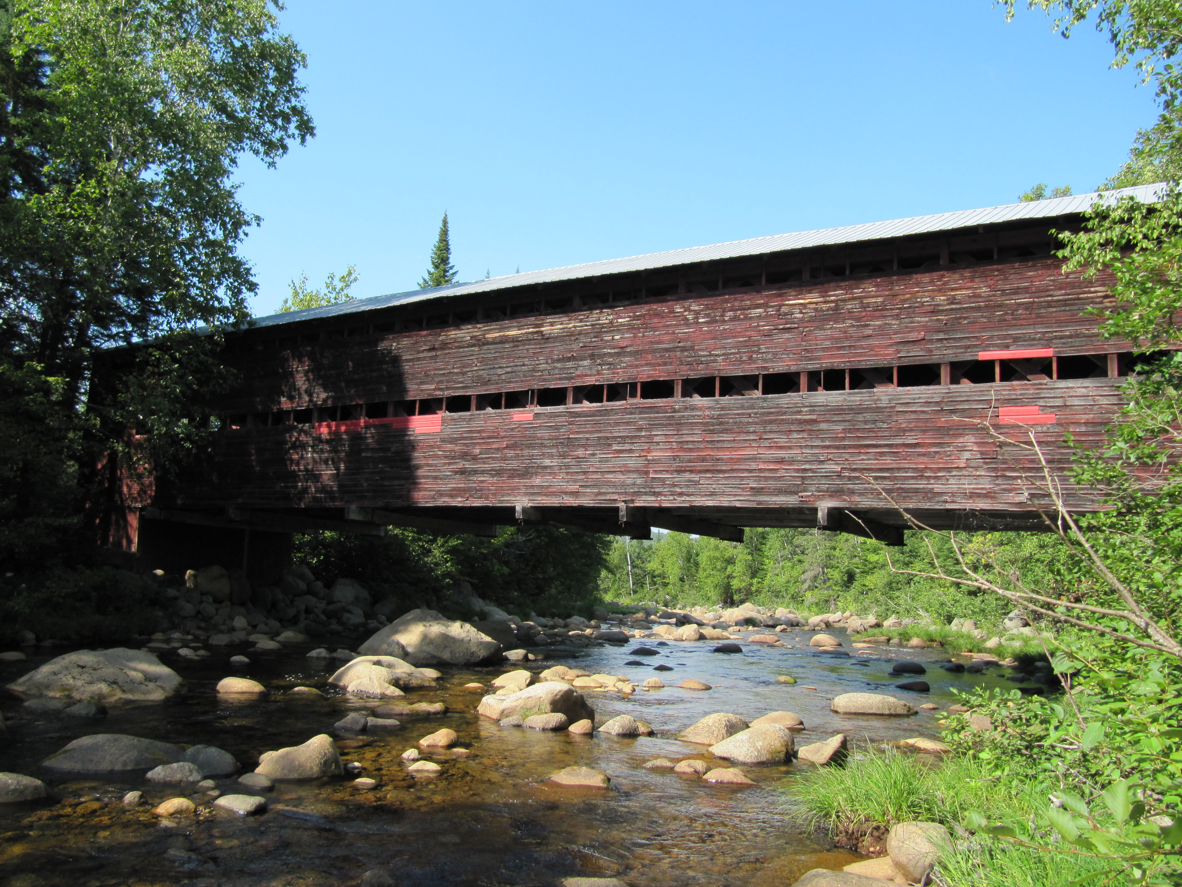 Pont de Saint-Placide-de-Charlevoix - vue de côté depuis l'amont (en regardant vers l'aval)